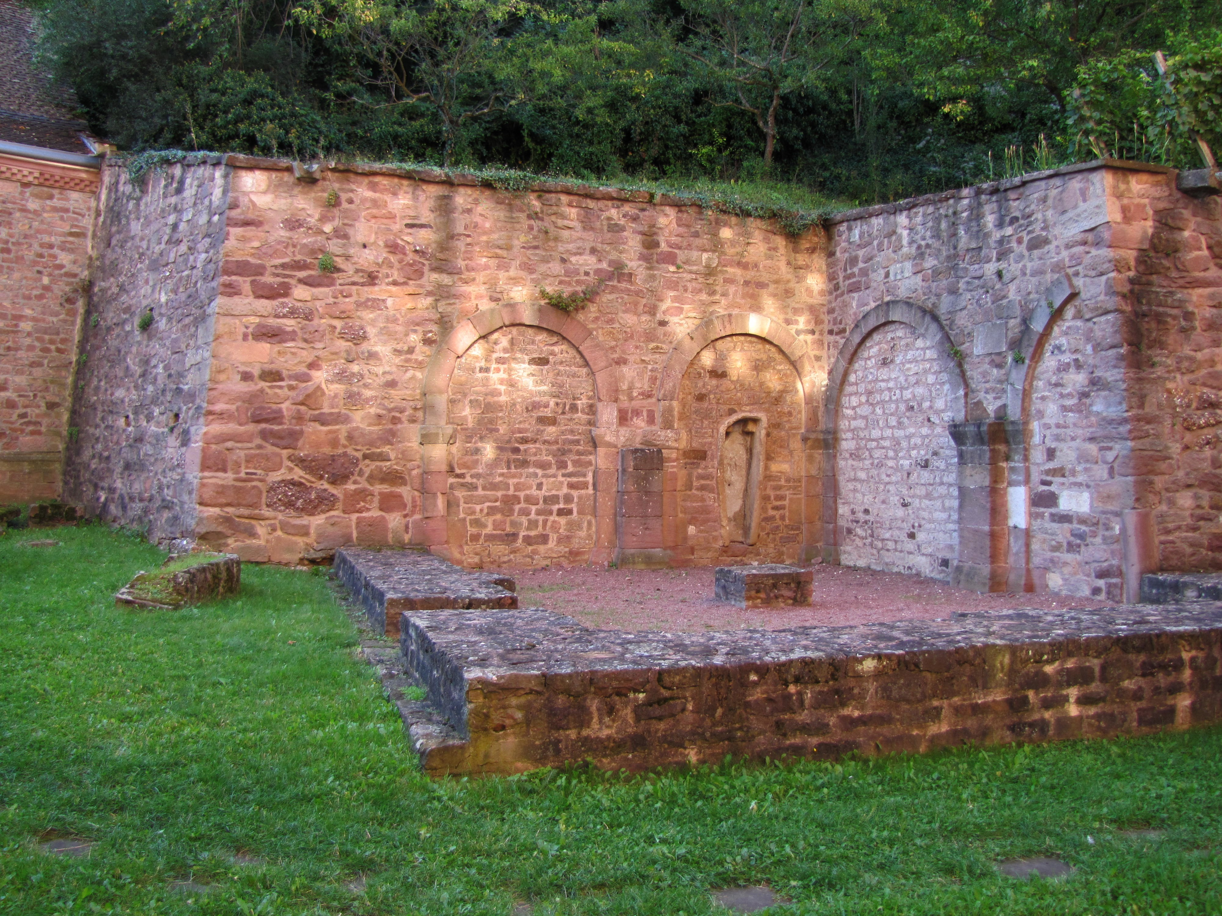 Alsace, Haut-Rhin, Église Saint-Pantaléon (XIIe-XIXe) de Gueberschwihr (PA00085433, IA68004163).Vestiges de l'ancien mur avec sarcophage: .